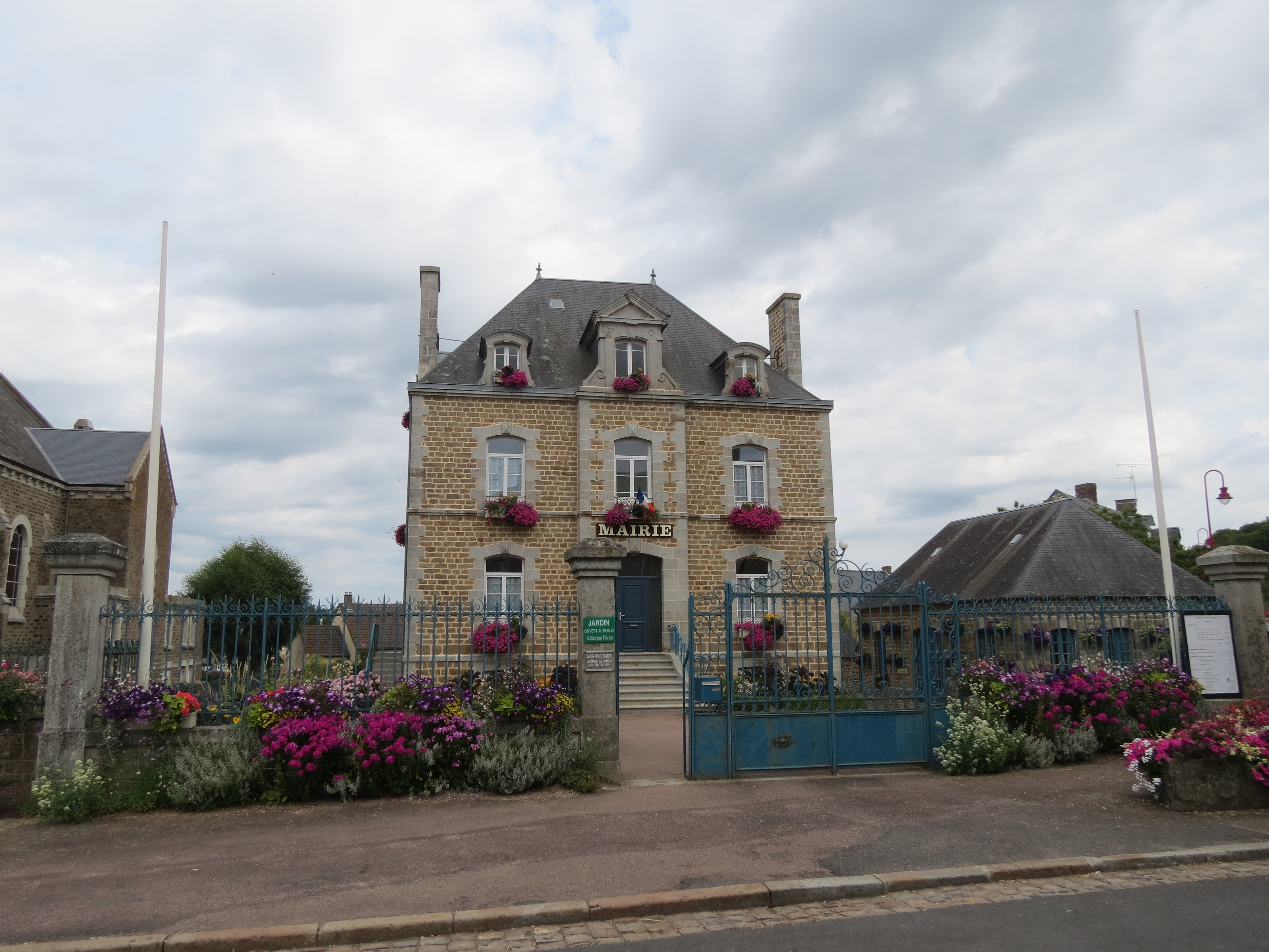 Mairie de Saint-Fraimbault.